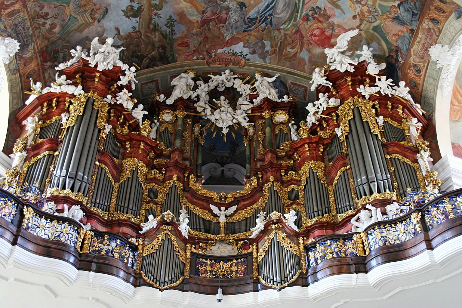 Kościół parafialny Wniebowzięcia NMP (d. klasztorny NMP Łaskawej)